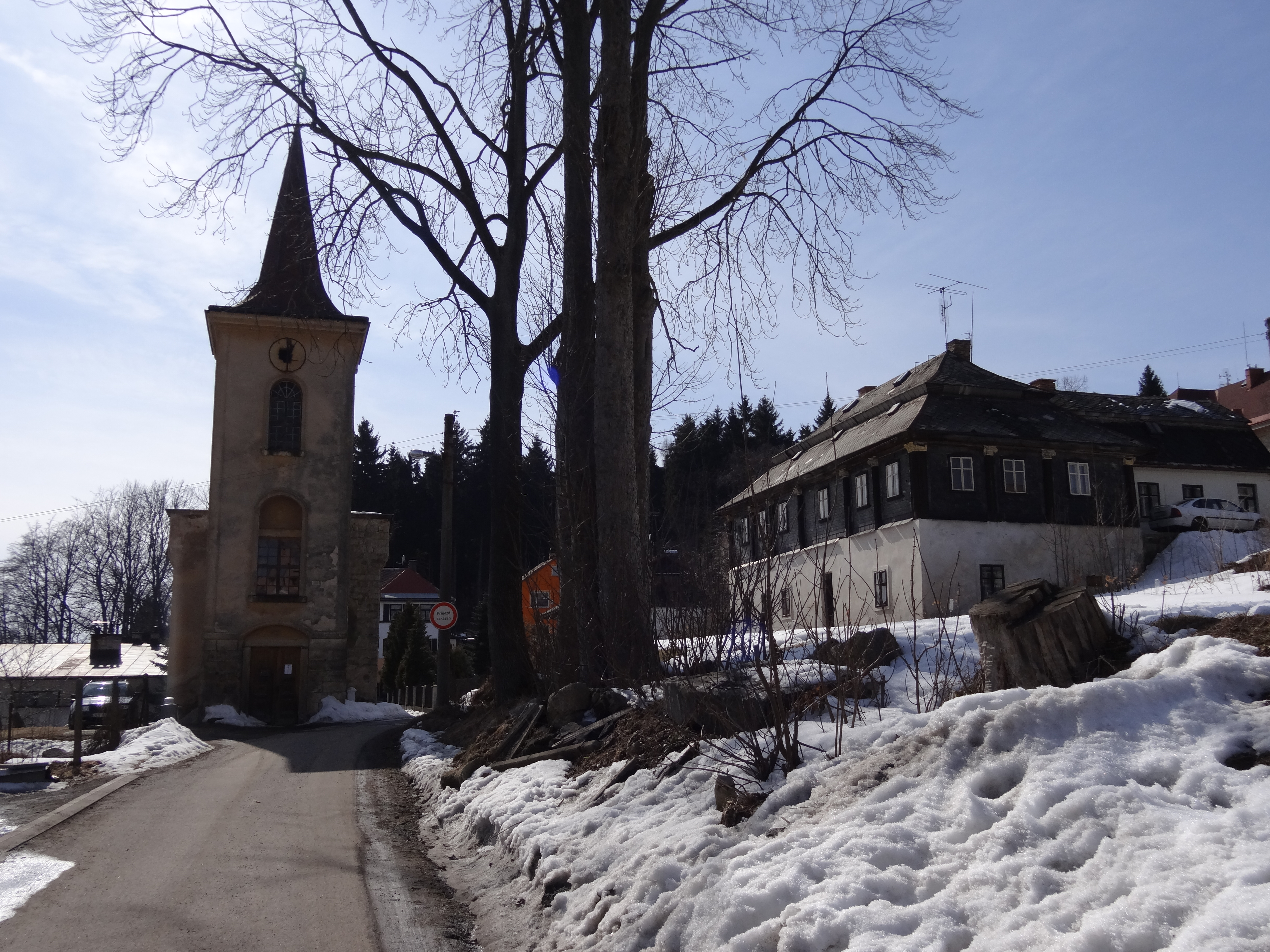 Vrkoslavice - kostelík sv. Jana Nepomuckého (2) a ulice U Kaple